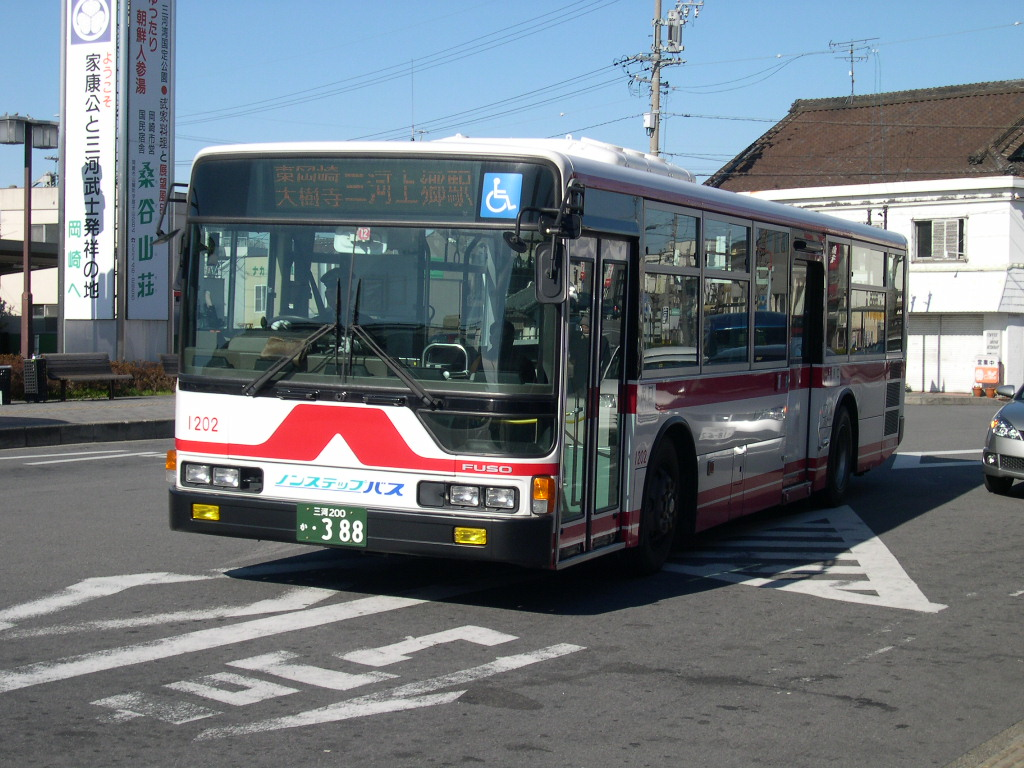 岡崎駅前にて 2004-1-11撮影